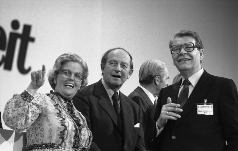 26. Bundesparteitag der CDU in der Friedrich-Ebert-Halle in Ludwigshafen [Laurien, Filbinger, Köppler] 23.-25.10.1978